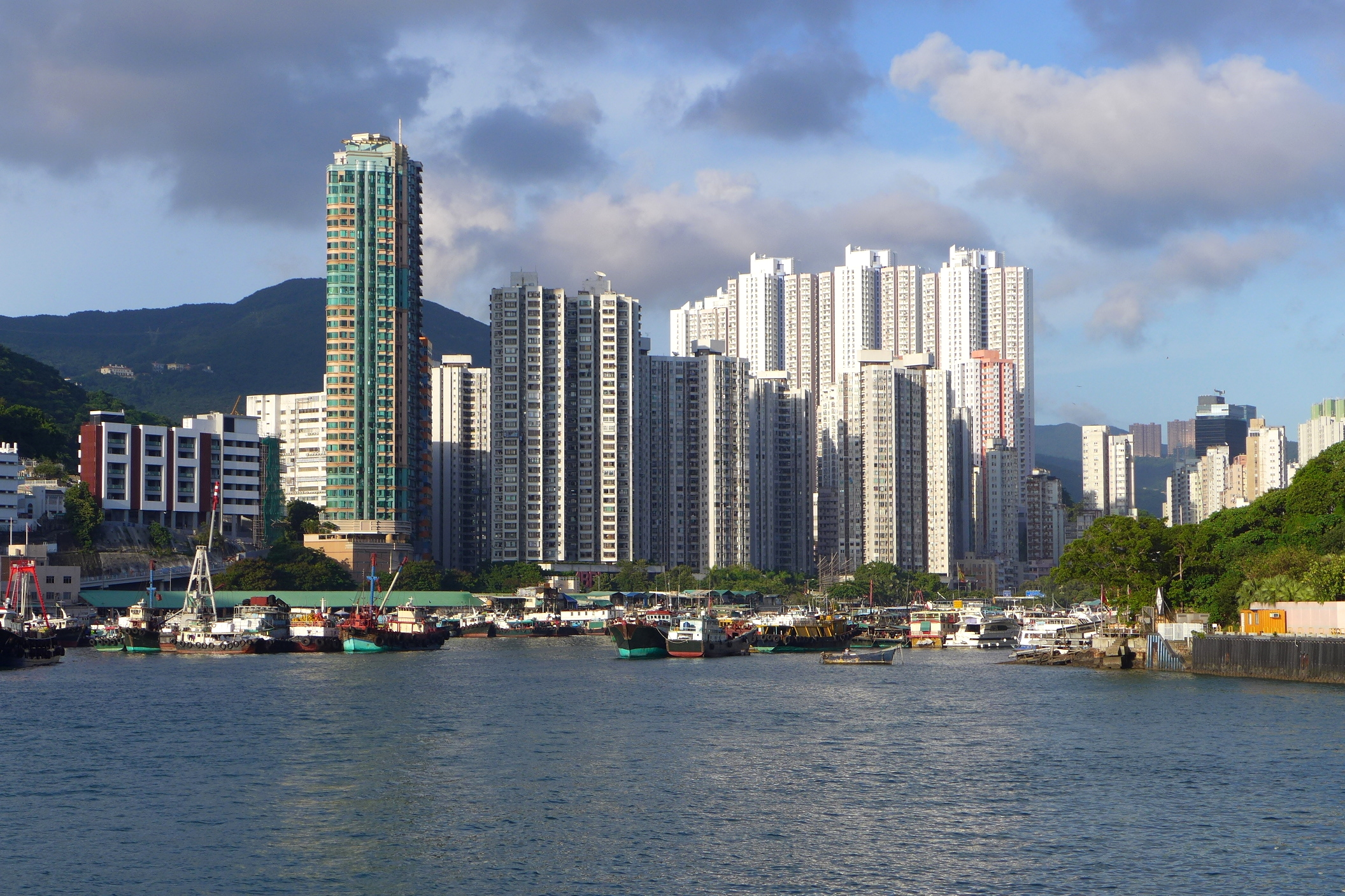 Aberdeen Buildings